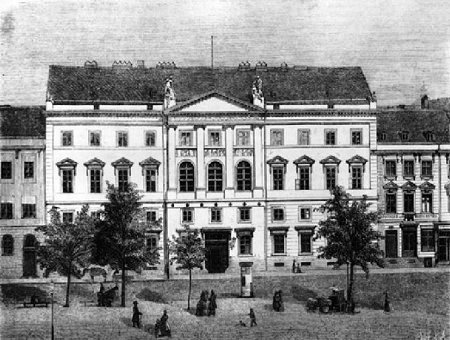 Palais Hardenberg (ehemals Sitz des preußischen Abgeordnetenhauses), Holzschnitt "Das Sitzungsgebäude des Zollparlaments" aus Die Gartenlaube, 1868, Nr. 20, S. 309, siehe File:Die Gartenlaube (1868) 309.jpg